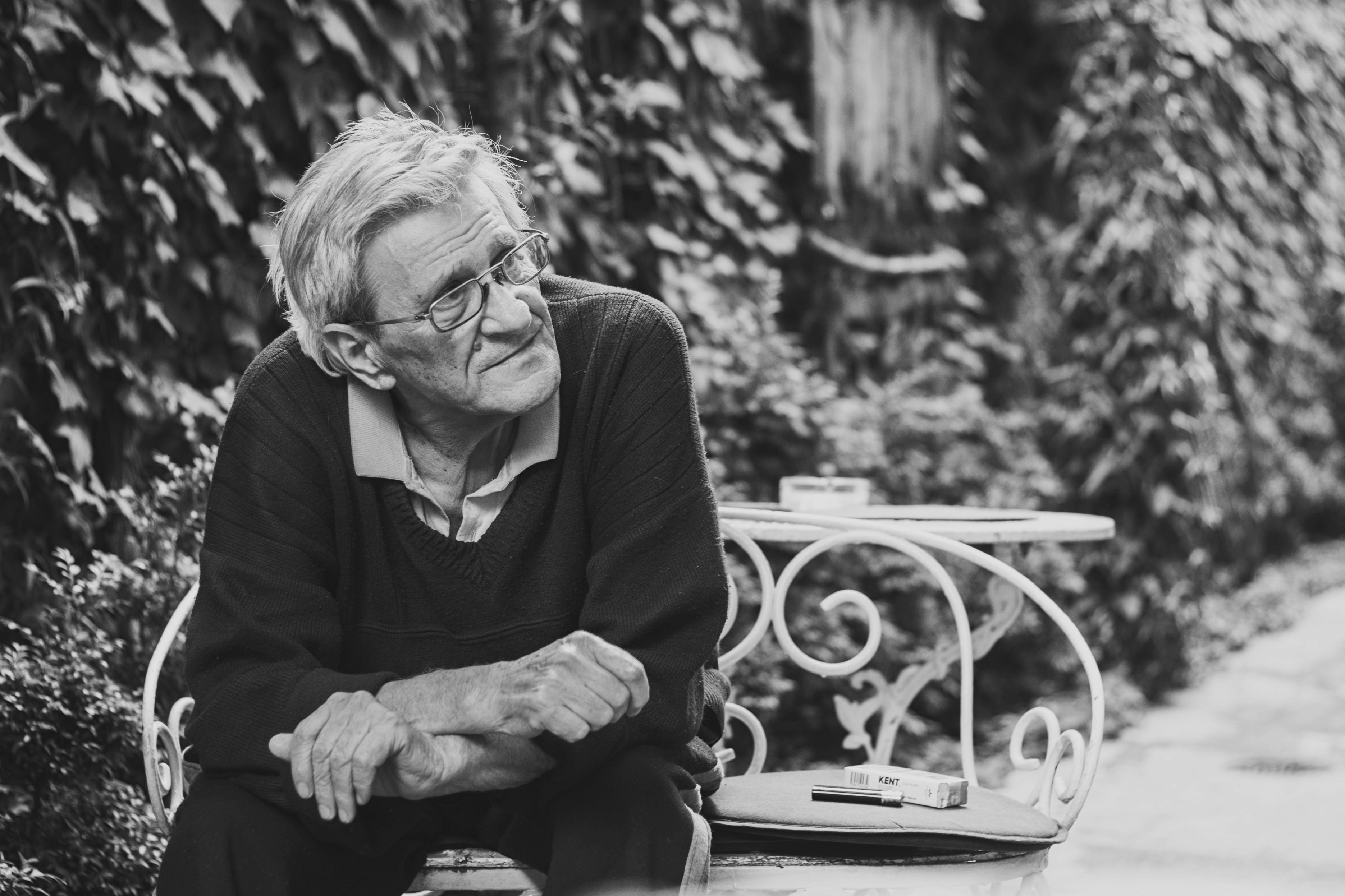 Valeriu Pantazi de ziua sa, în data de 17 mai 2015 în curtea pictorului Paul Mecet.